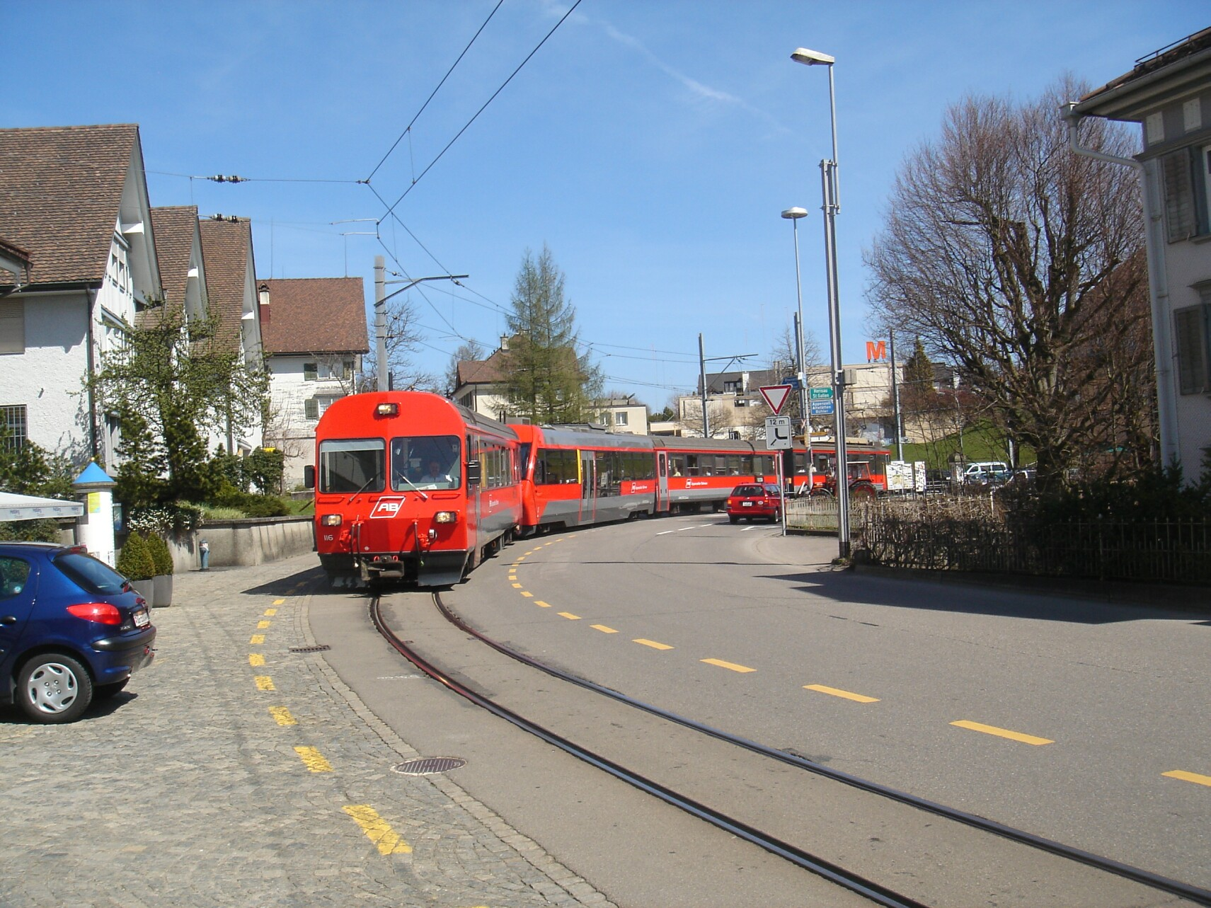 Zug der Appenenzeller Bahnen (Gaiserbahn) in Teufen.